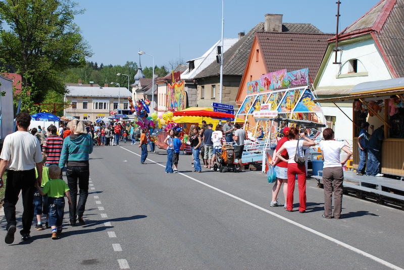 Pouť v Trhové Kamenici